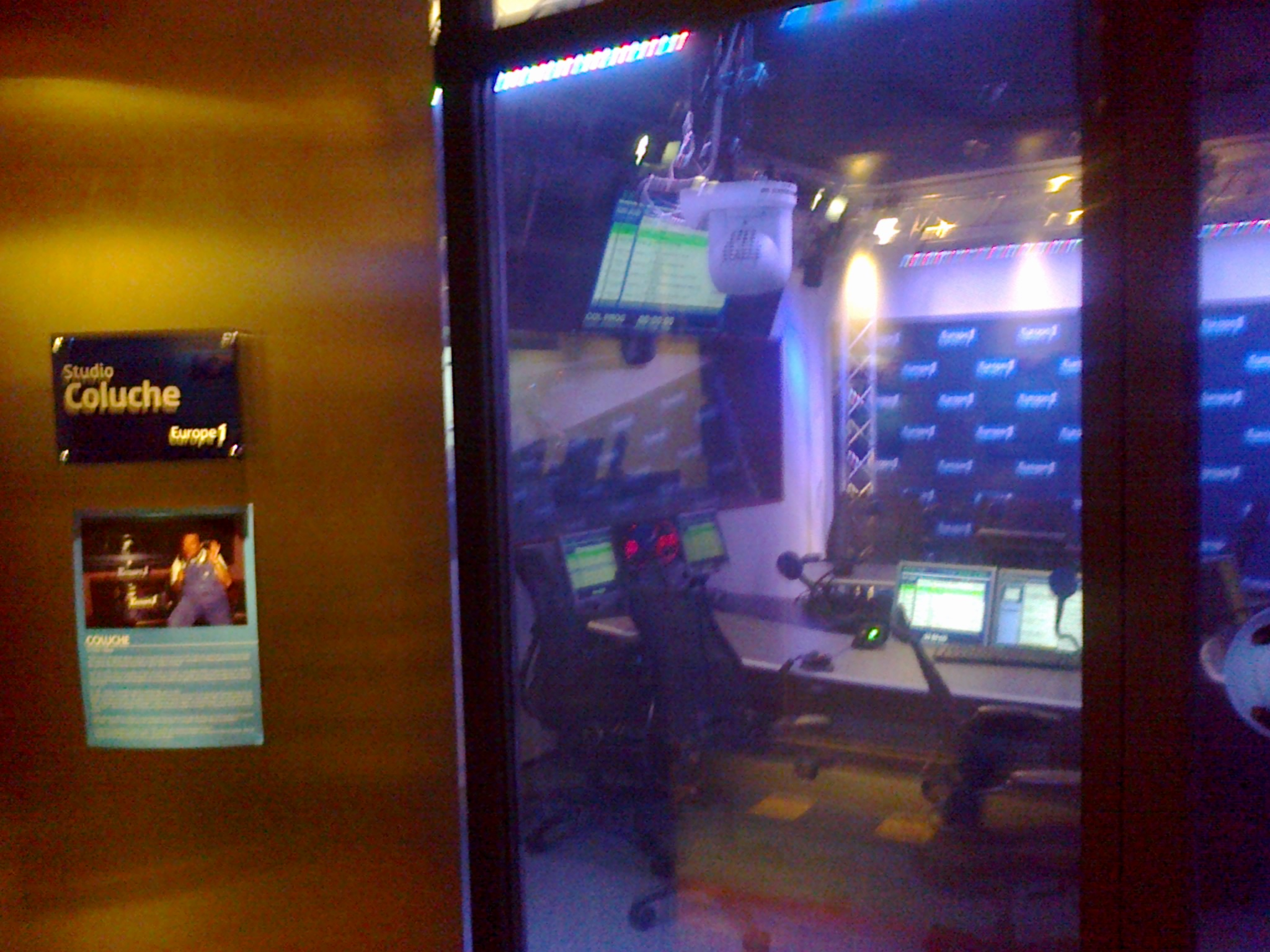 Studio Coluche